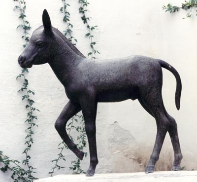 Platero en bronce. Moguer. Huelva. 1963.